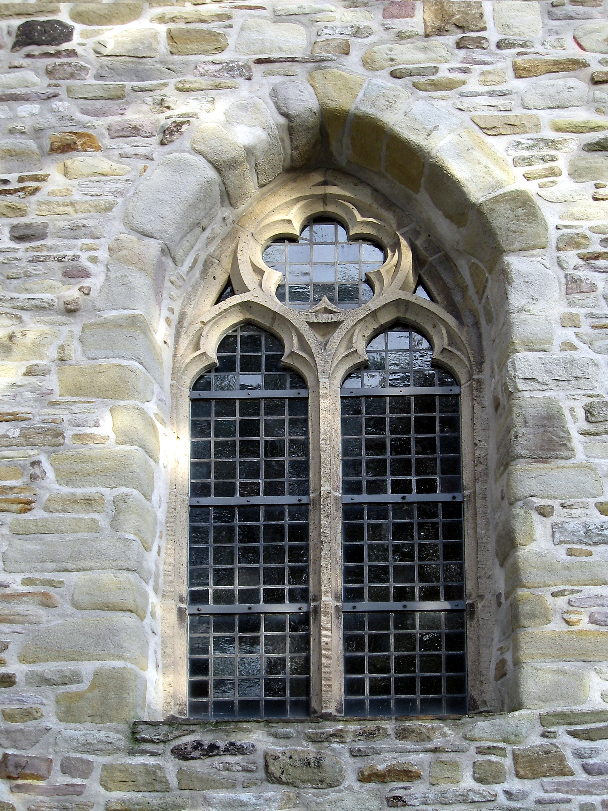 Bochum Stiepel, Stiepeler Dorfkirche, Westfassade, Südschiff, Fenster